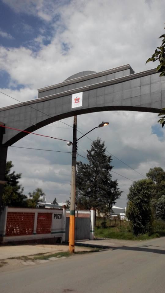 Arco de la entrada de San Mateo Ixtacalco